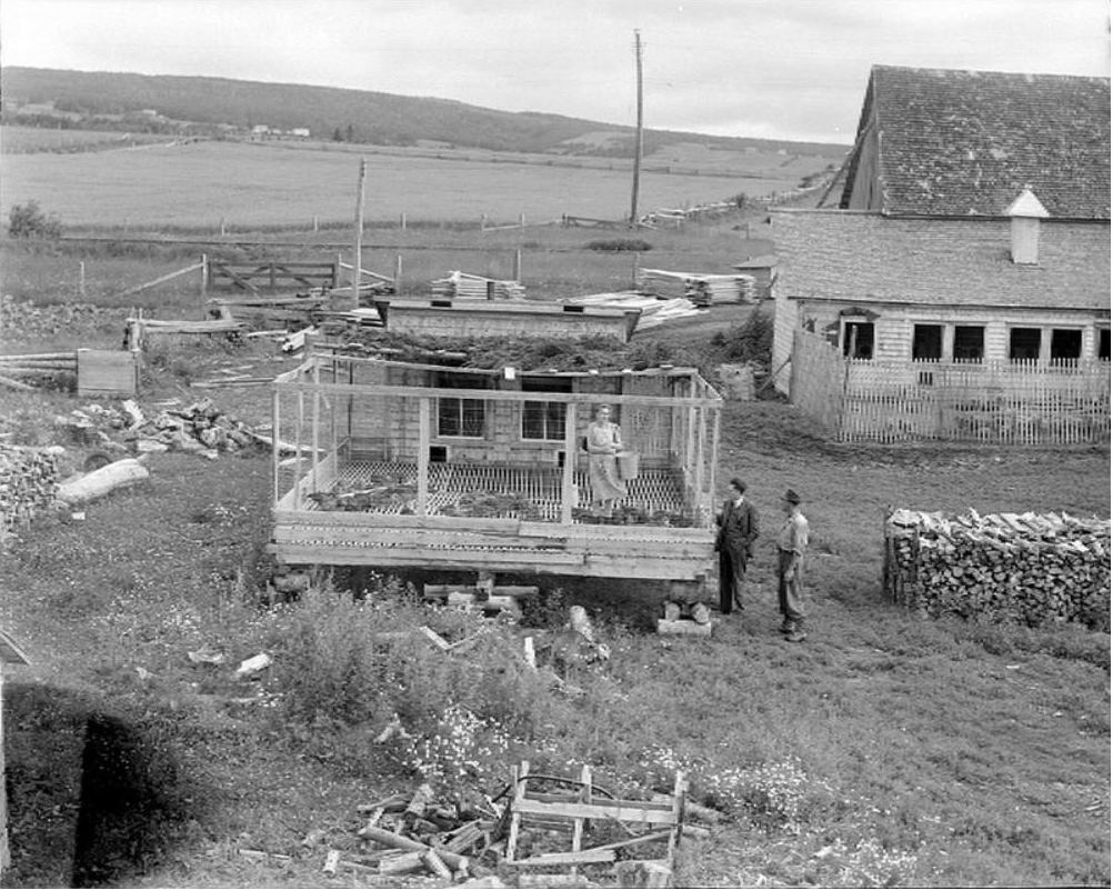 Élevage de dindes à Saint-Alphonse-de-Caplan, en Gaspésie Un couple discute avec un visiteur de leur élevage de dindes.